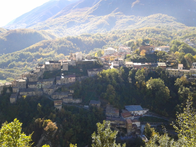 Veduta di Pescocanale